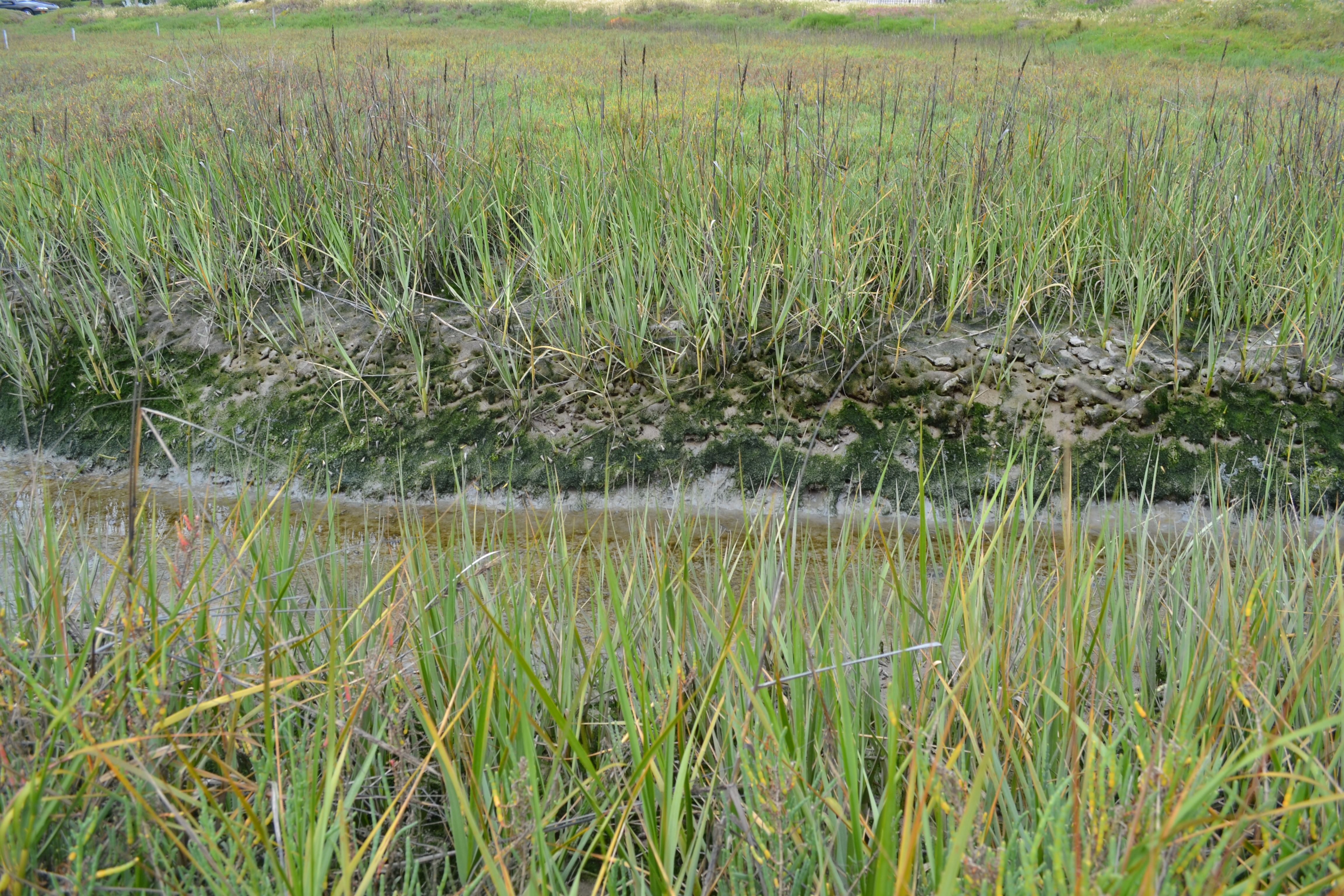 California Cordgrass (Spartina foliosa) (Lisa Cox/USFWS)